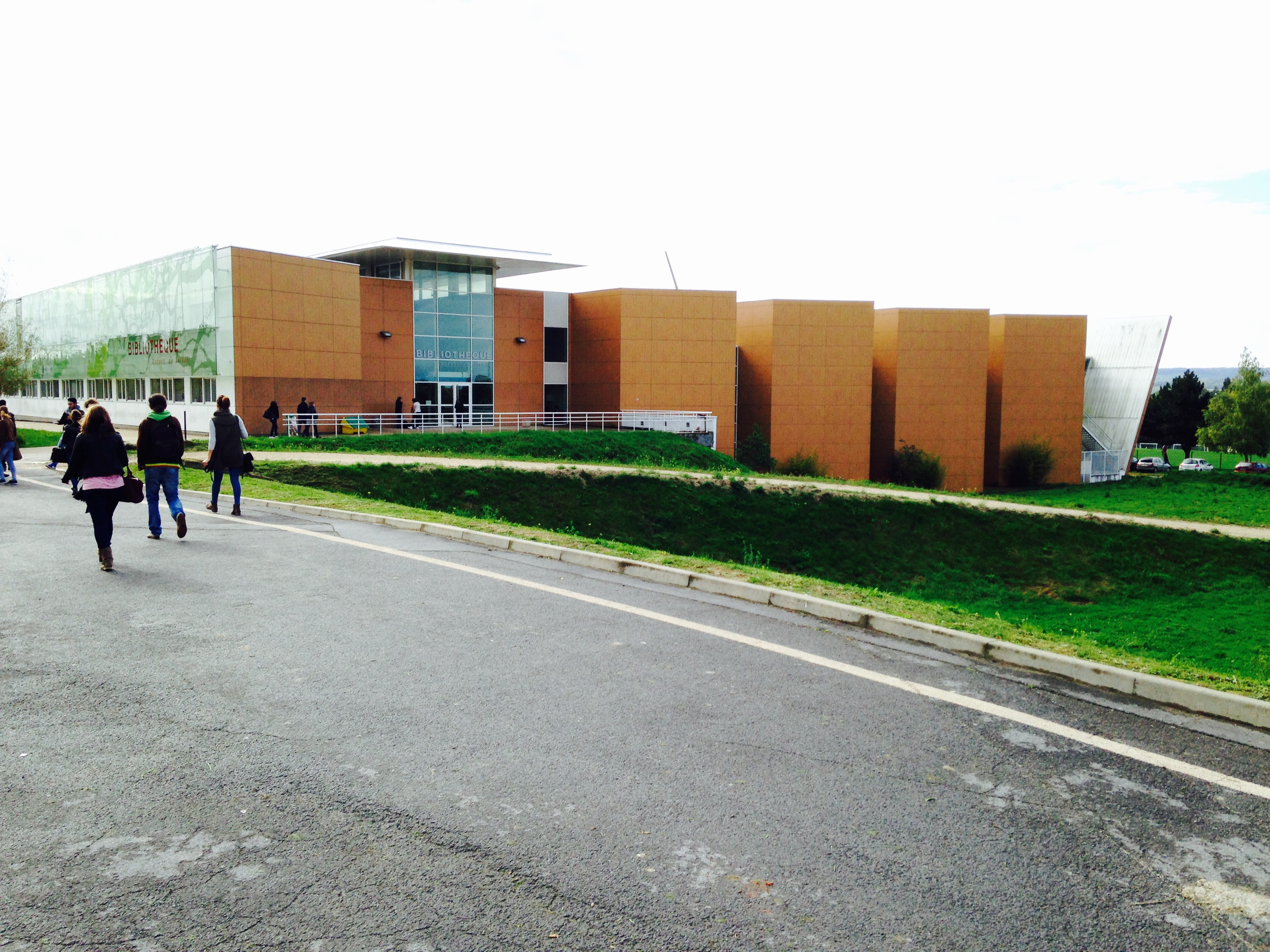 Vue large bibliothèque Robert de Sorbon